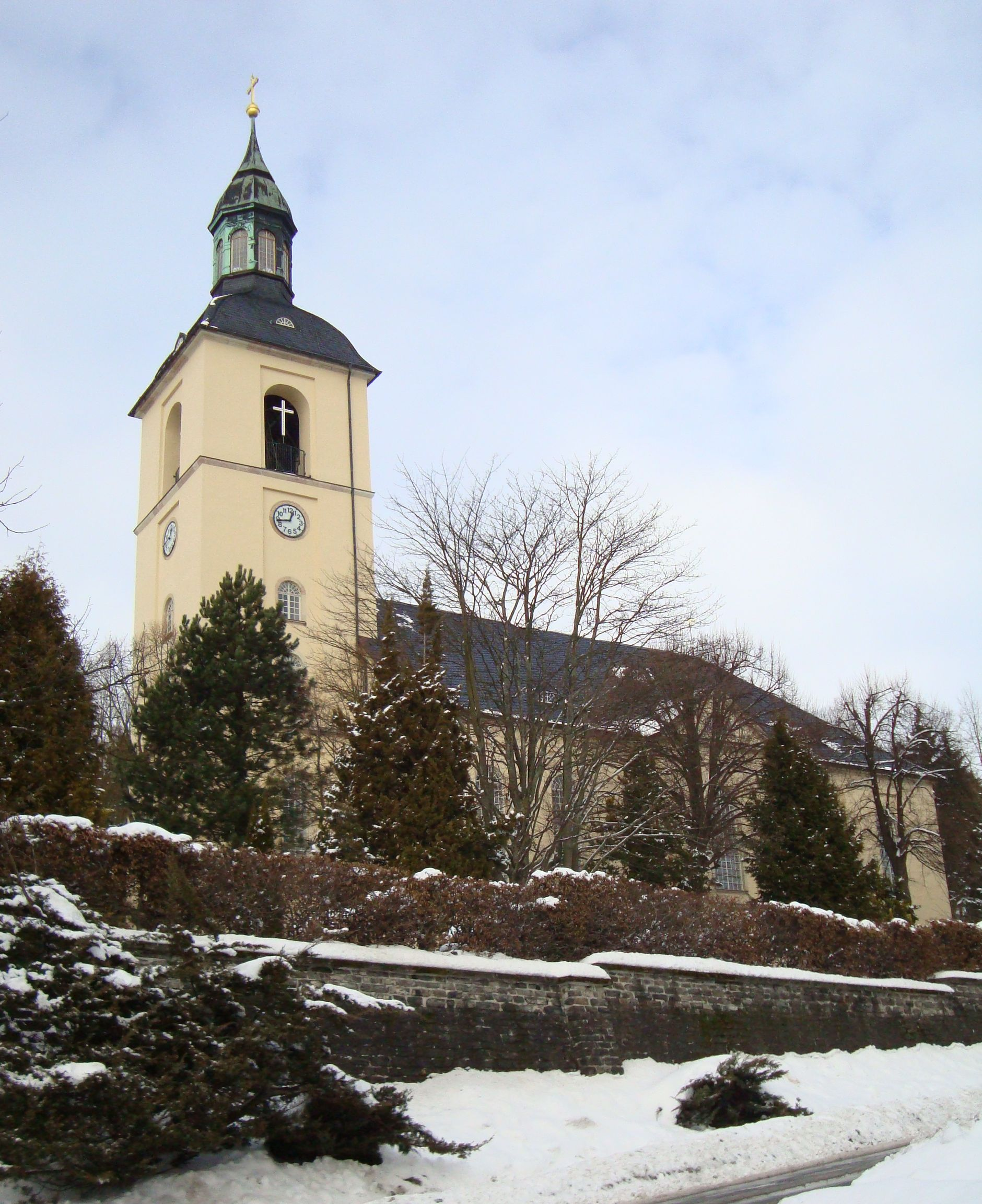 Evang.-luth. Kirche in Thalheim/Erzgeb.